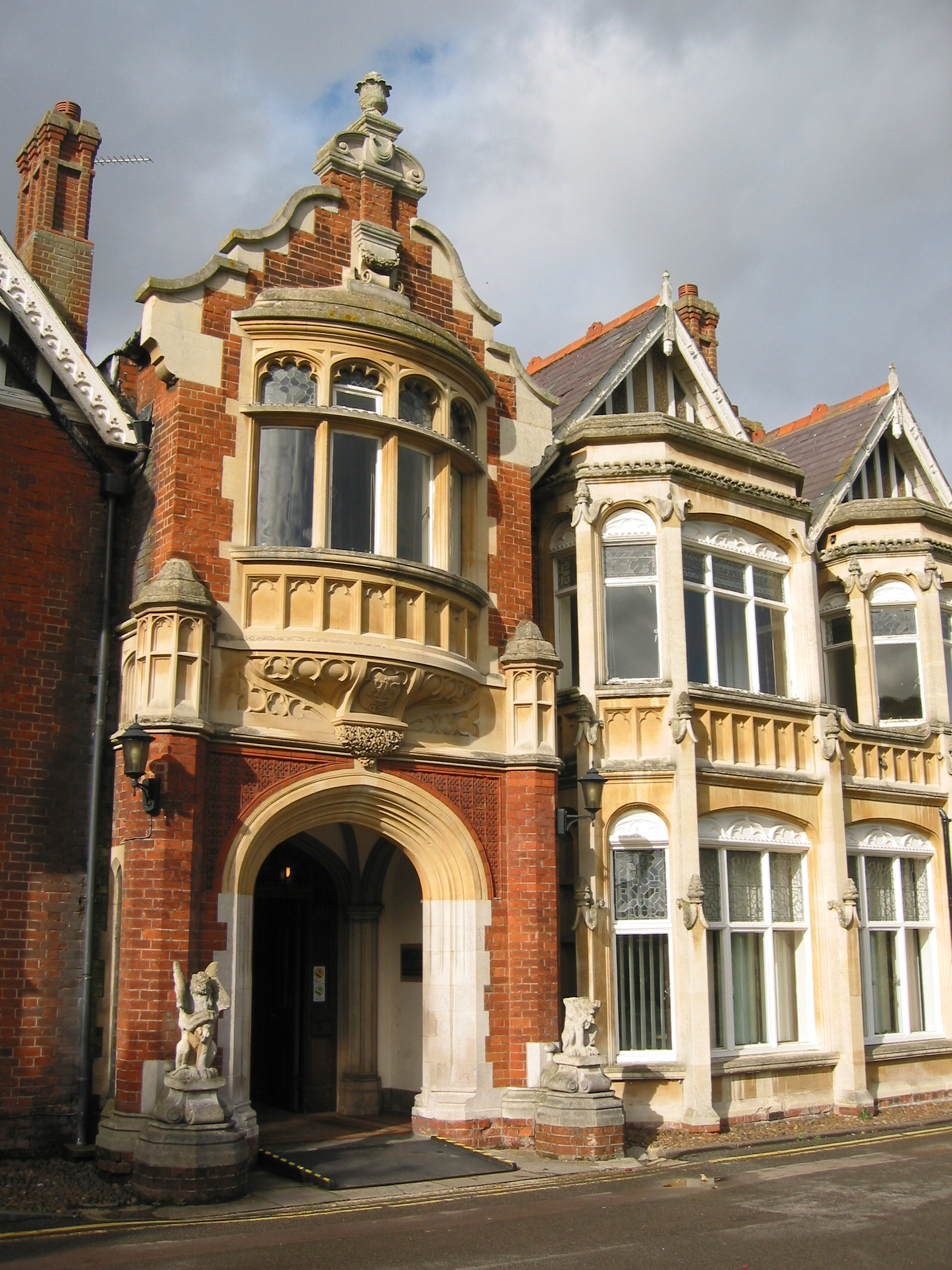 Bletchley Park